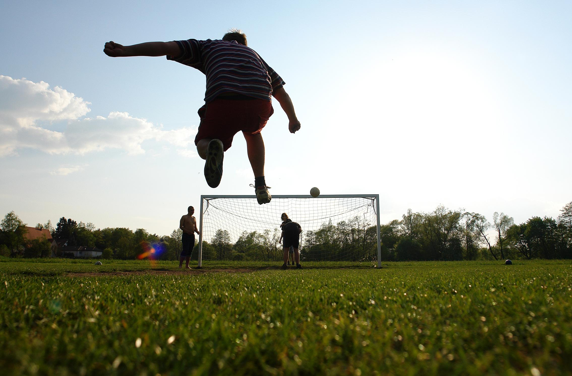 Hochball